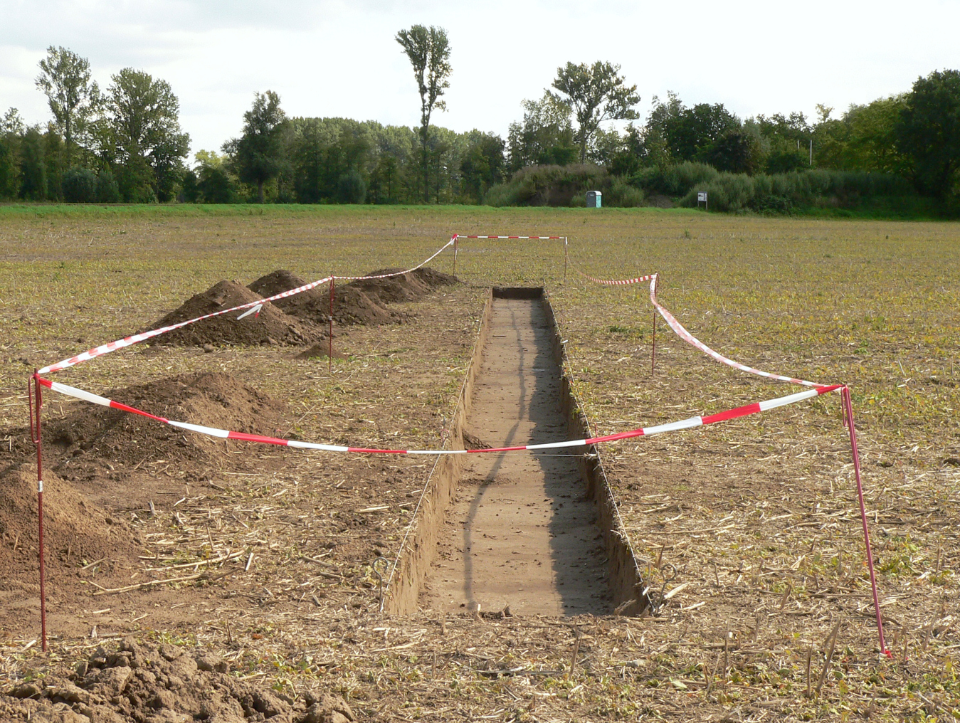 Römisches Marschlager Wilkenburg, Ausgrabungsschnitt des NLD